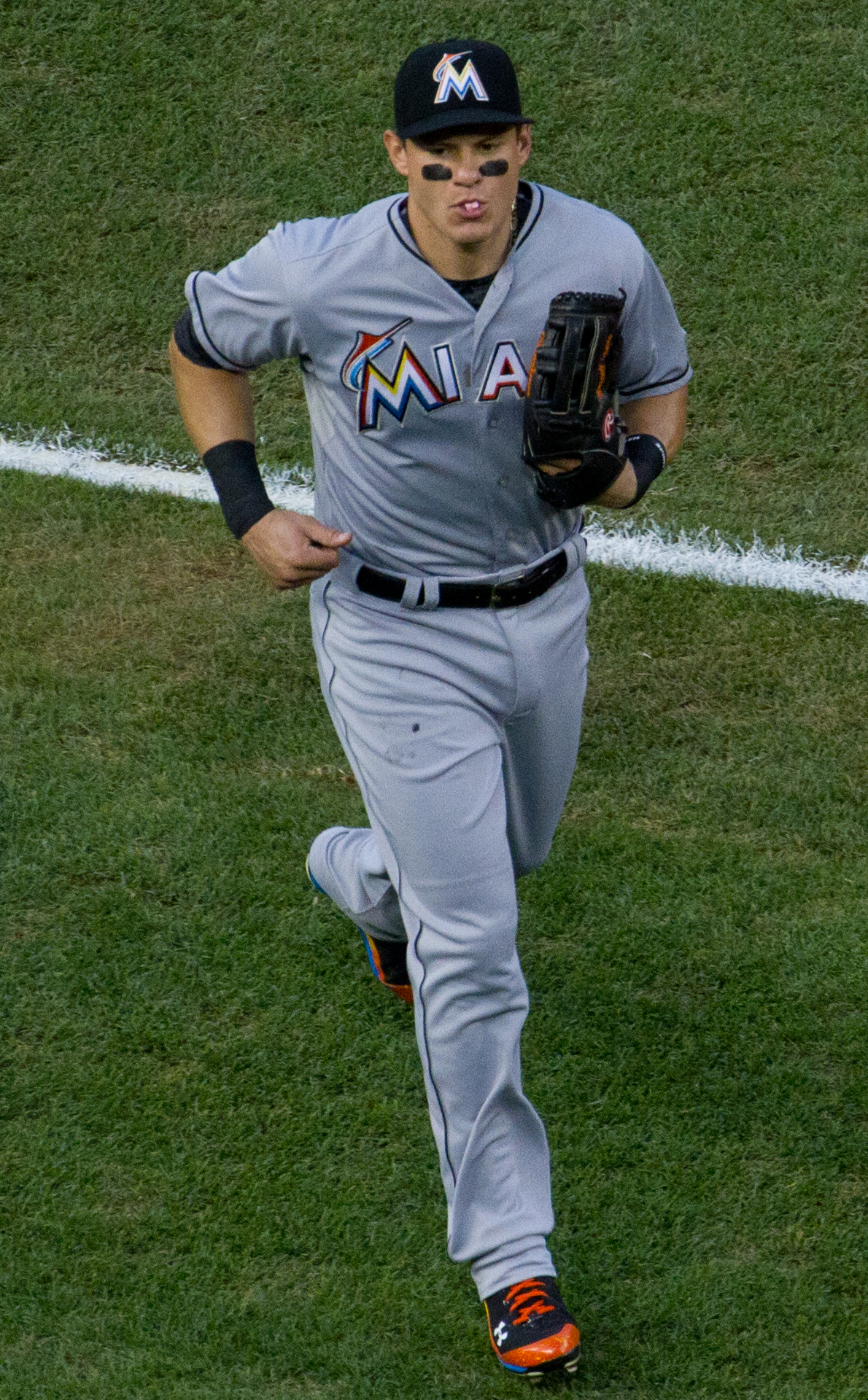 Derek Dietrich